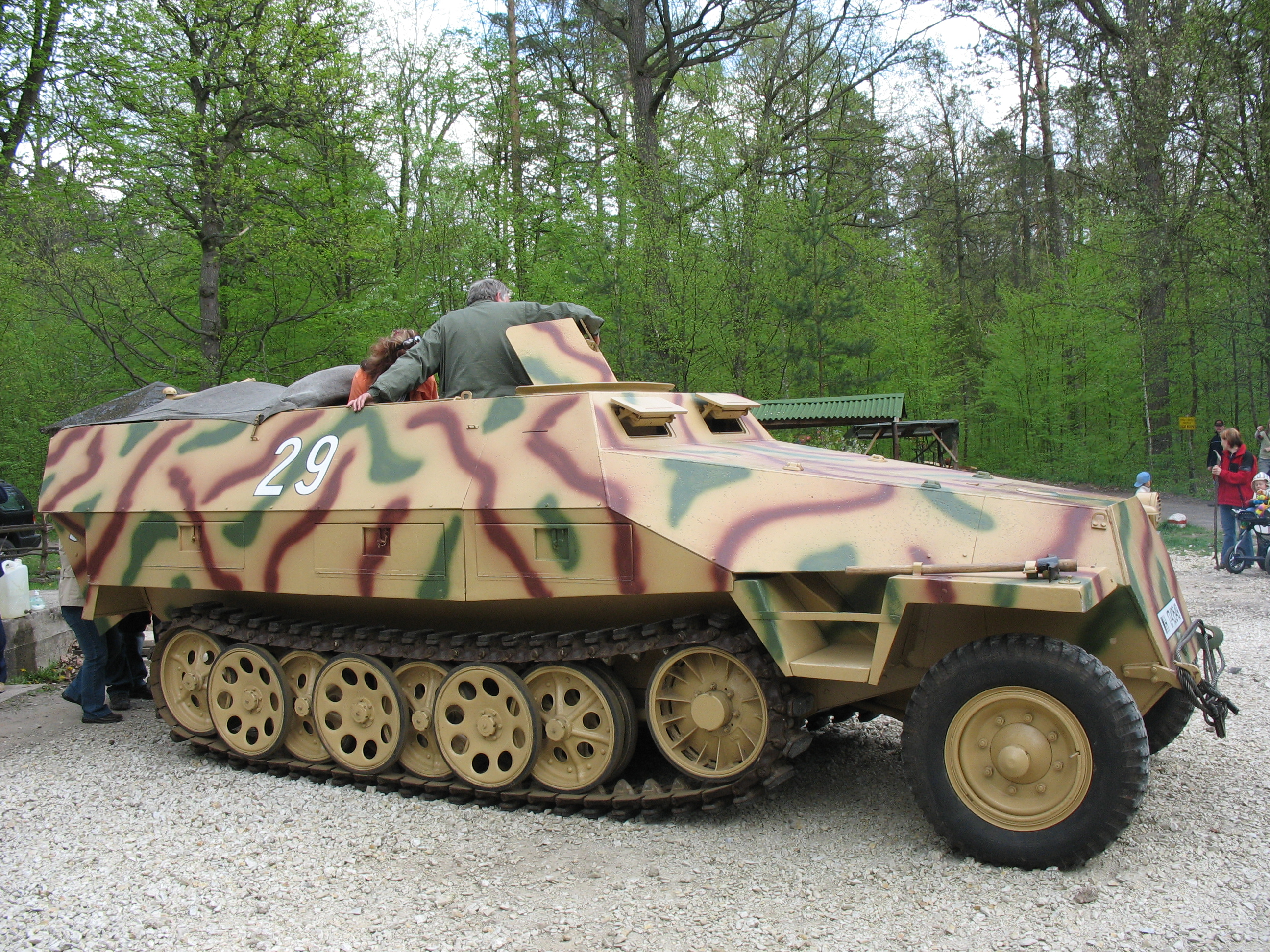 SdKfz 251 "Rosi"